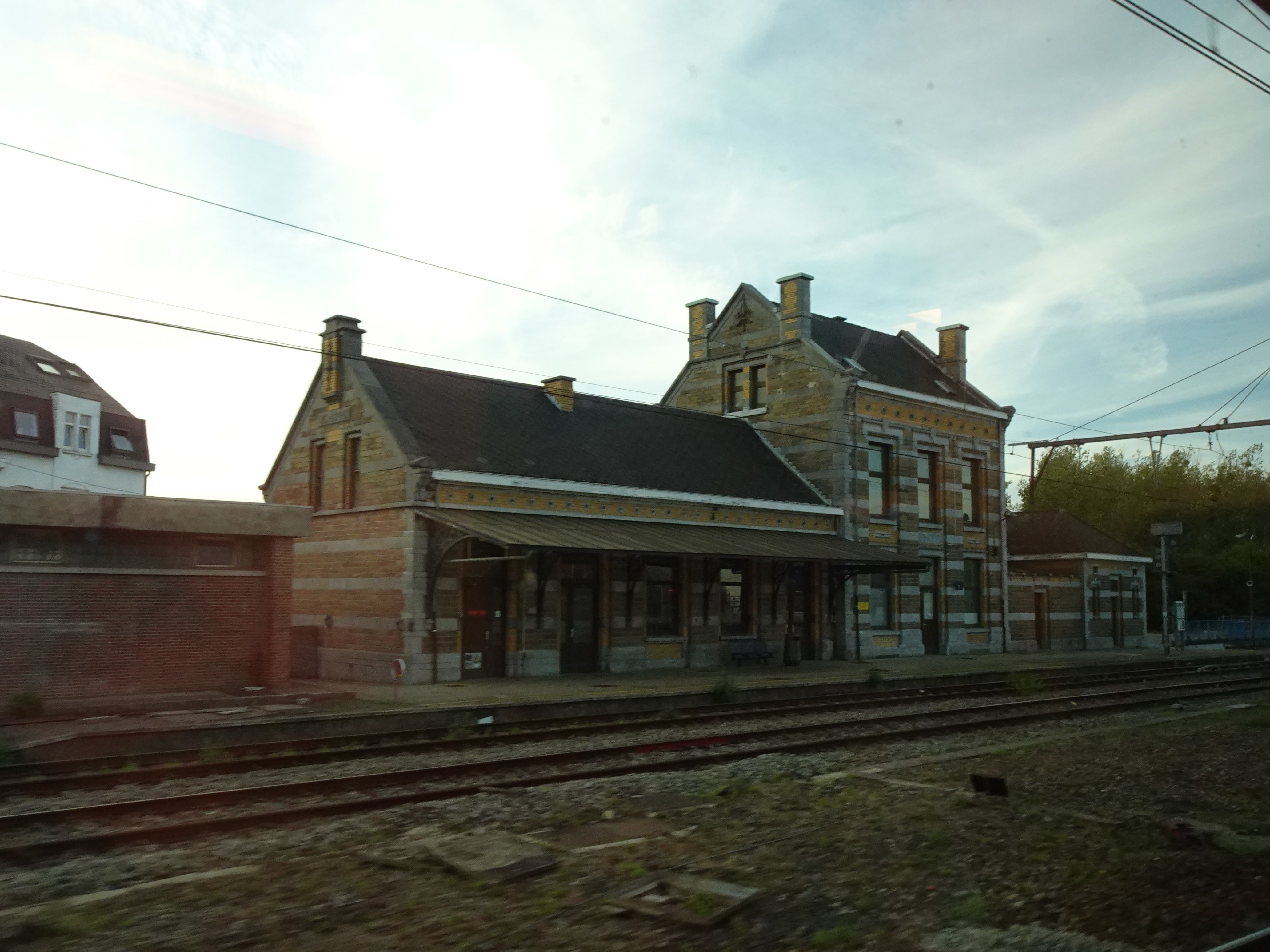 Gare de Jemeppe-sur-Sambre, vue depuis un train IC Namur - Bruxelles dévié par les lignes 130 et 140